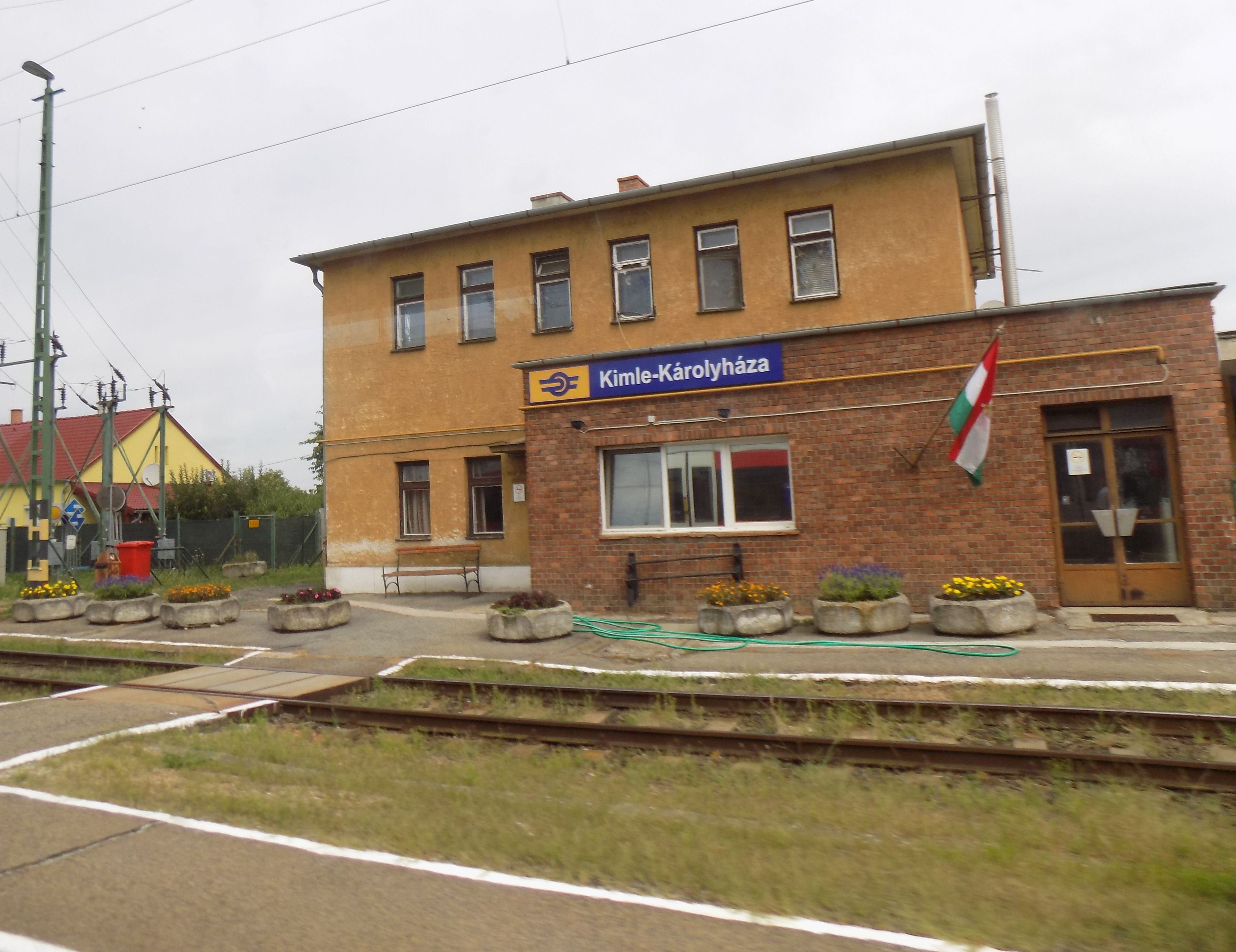 Kimle-Károlyháza vasútállomás